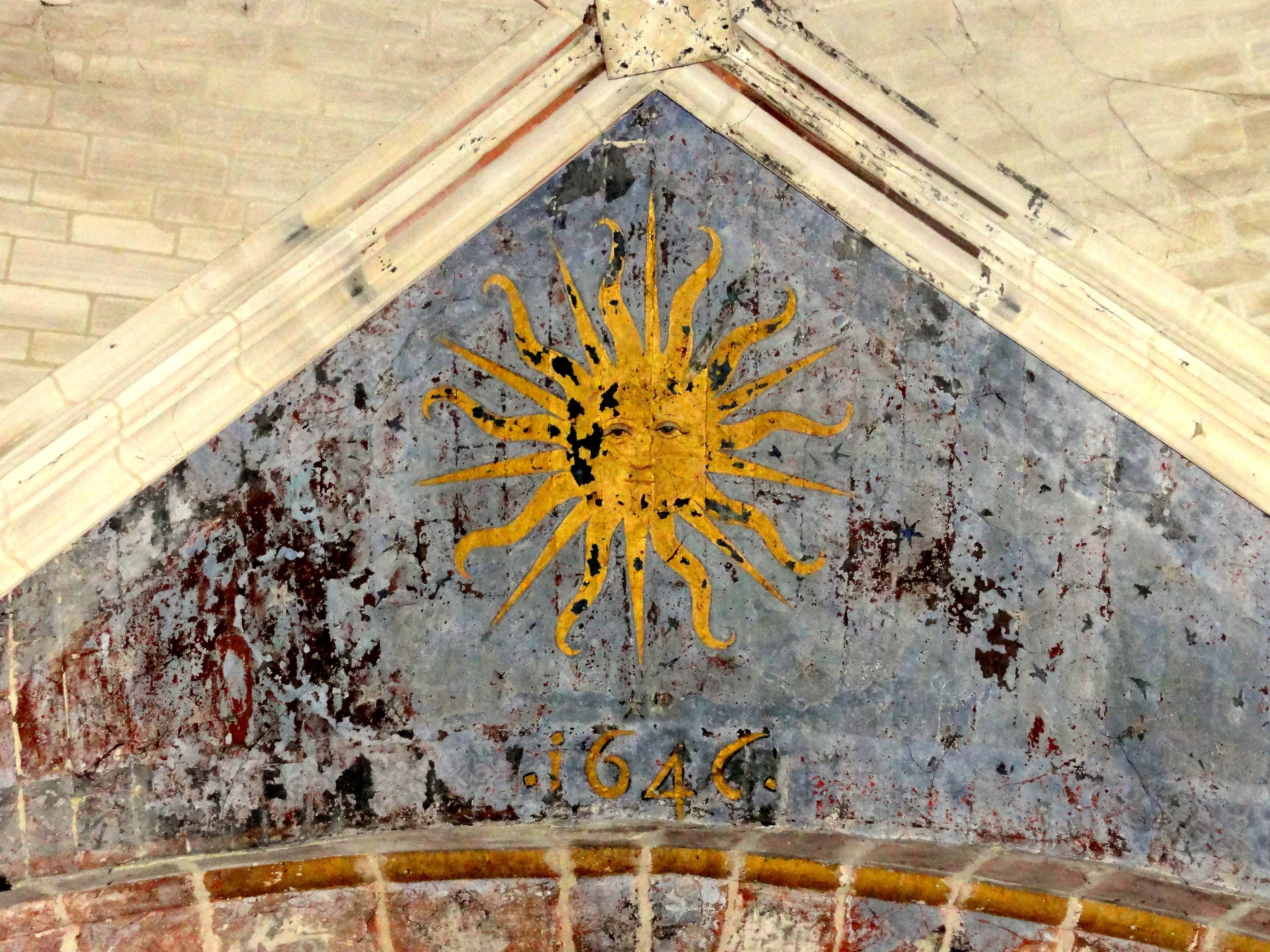 Voir titre.